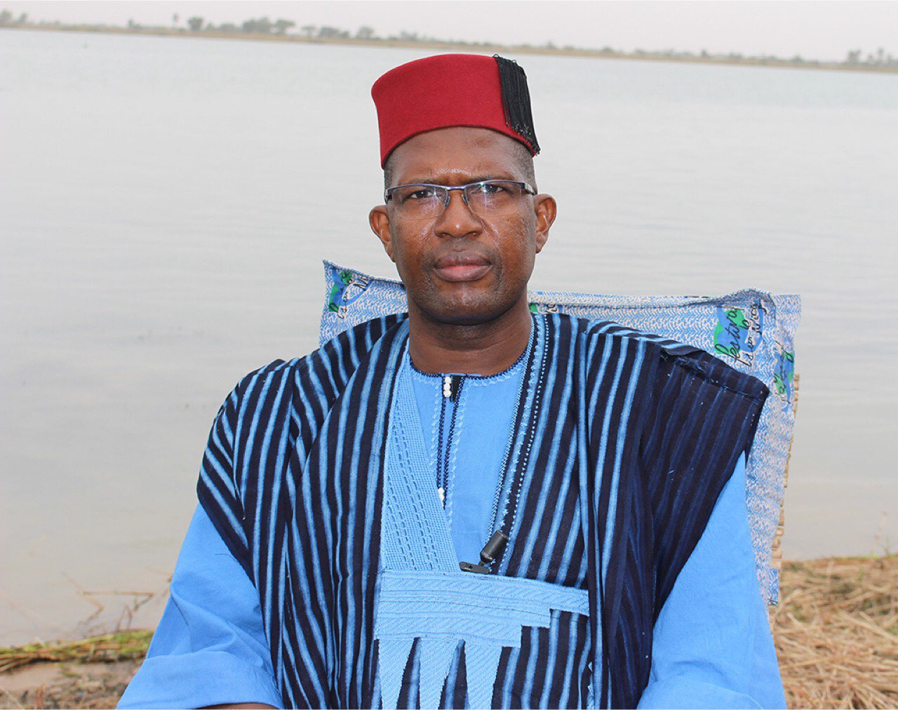 Mamou Daffé Entrepreneur en gestion d’art et culture, Mamou Daffé lutte pour la culture et le développement local. Il s’intéresse beaucoup aux liens existants entre les sphères culturelles et économiques. En 2005, il a fondé le Festival sur le Niger, un projet visant à valoriser les expressions culturelles, tout en stimulant l’économie malienne à travers l’art. Le Festival sur le Niger a contribué à réunir des acteurs économiques des communes et de la région au sein du Conseil pour la Promotion de l’Economie Locale (CPEL), première expérience en matière de prise en main du développement économique local par les acteurs locaux, créé en 2006. En 2011, il a créé le Centre Culturel Kôrè, un centre de référence sous régionale et l’institut de formation IKAM pour le développement des métiers de l’art et le perfectionnement des artistes et acteurs culturels du Mali et d’ailleurs. Mamou Daffé est le fondateur du concept de l’Entrepreneuriat Maaya, un modèle entrepreneurial avec des objectifs multiples qui s’inspire des valeurs humanistes du Mali et qui met l’accent sur la relation entre l’individu et la communauté. M. Daffé est membre fondateur et premier président du Réseau KYA, le réseau des organisations culturelles du Mali. Il a dirigé le réseau panafricain ARTERIAL NETWORK d’Octobre 2015 à Novembre 2017. Mamou Daffé est le président-fondateur de la Fondation Festival sur le Niger.